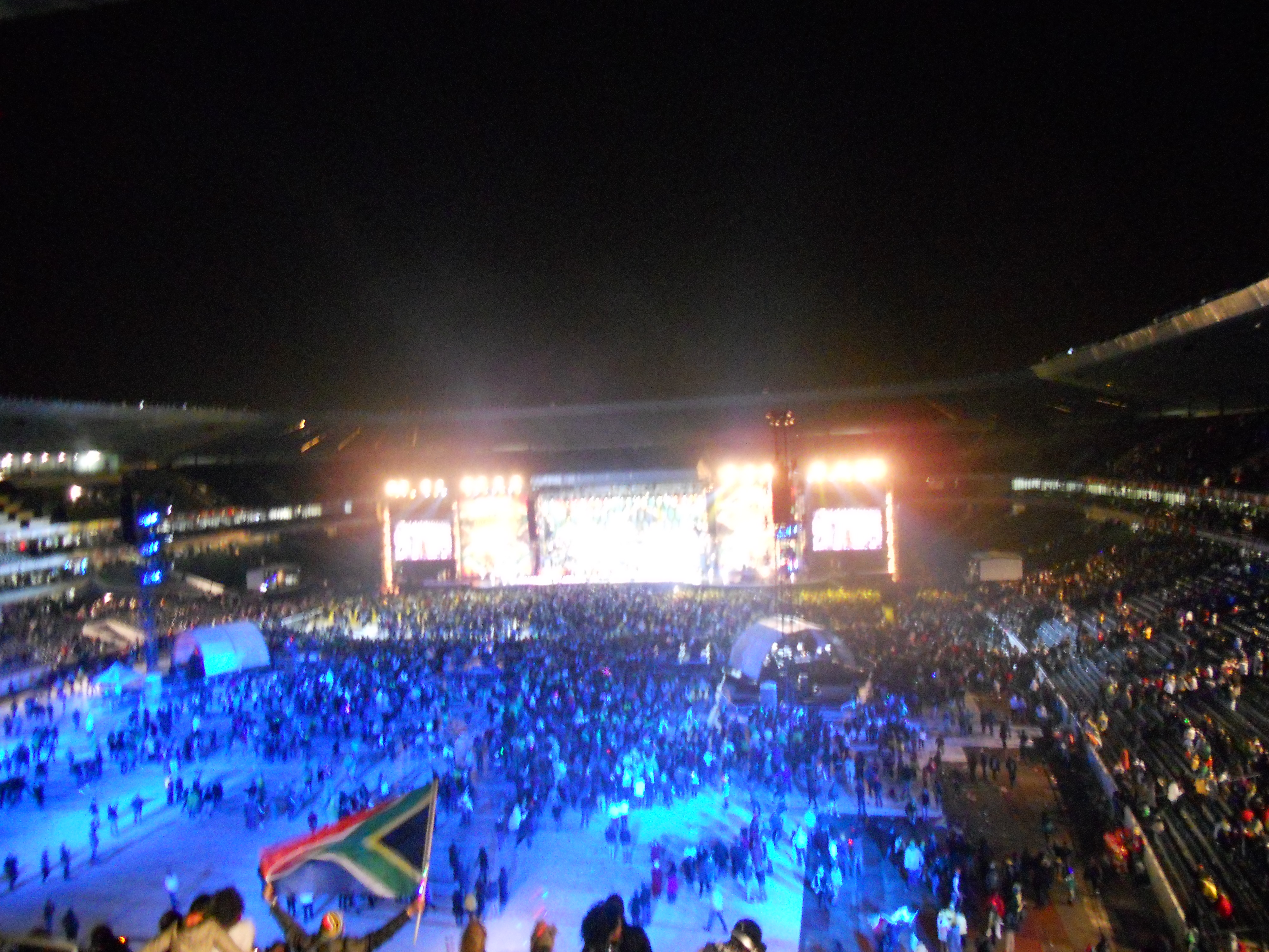 Orlando Stadium opening concert